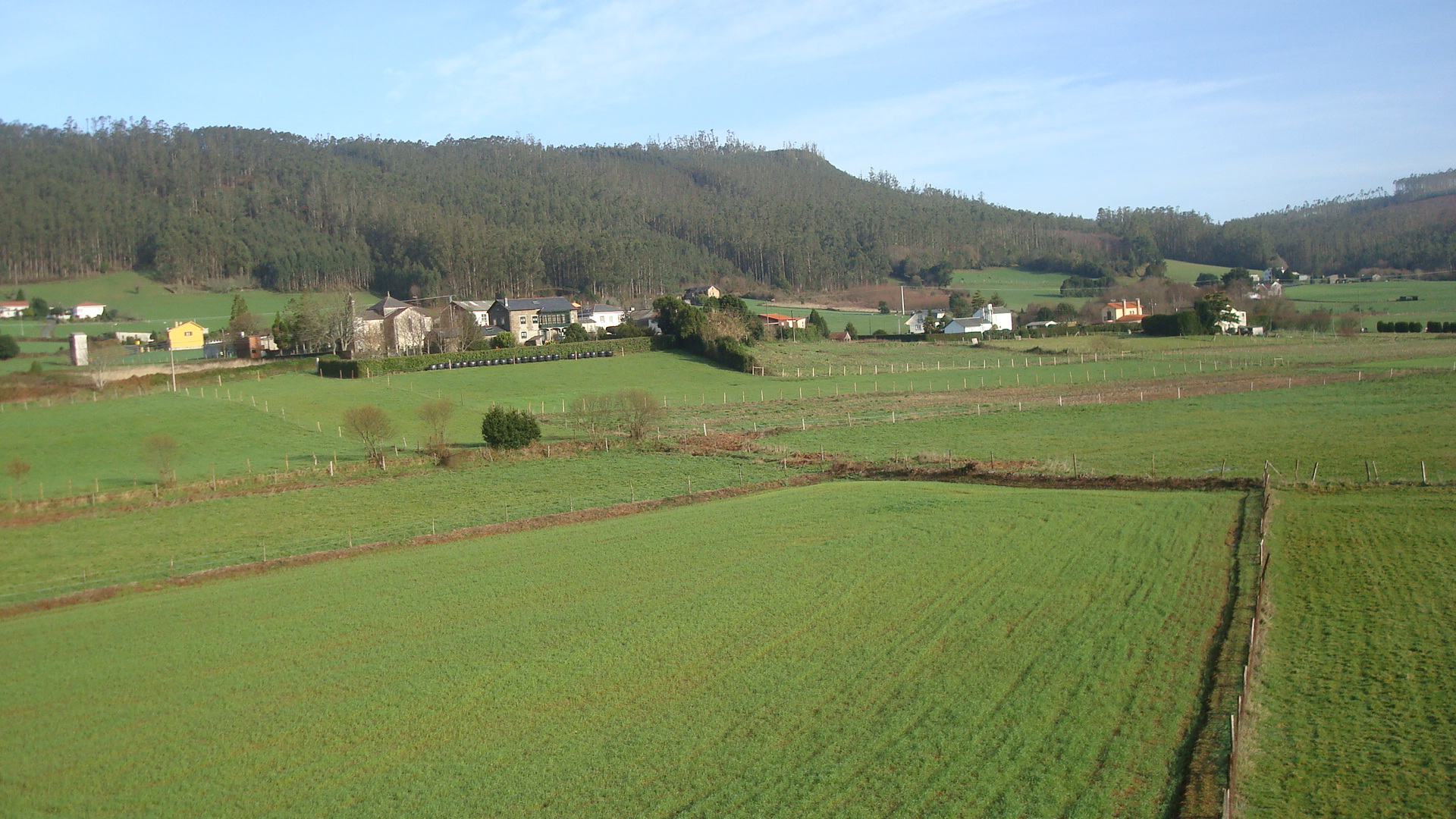 Imaxen da parroquia de Santa Cruz de Moeche